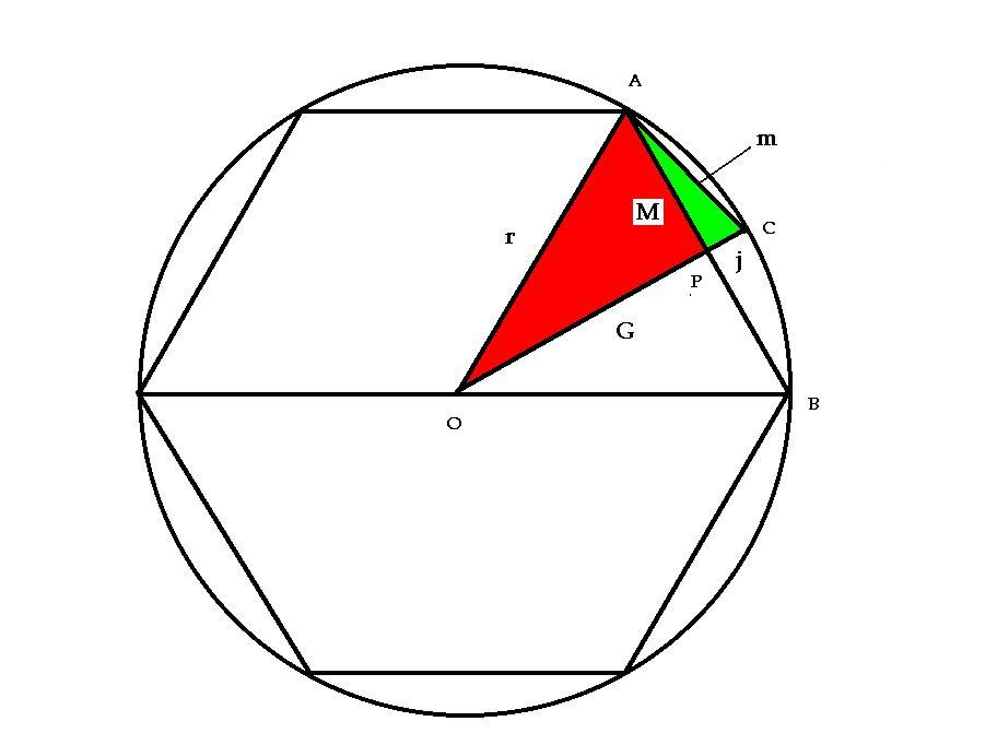 Liuhui's disection circle to calculate Π 刘徽割圆术原理